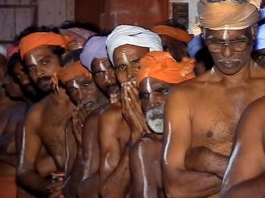 I Vaikunda Raja, took this photo graph.